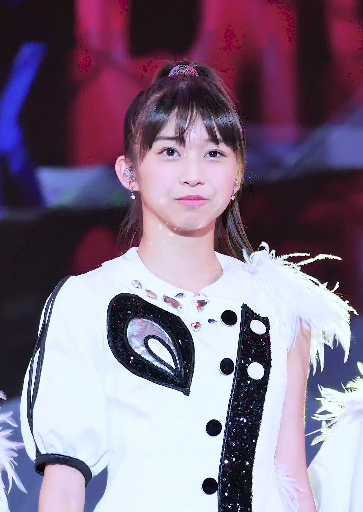 161006 AMN 빅 콘서트 - 마키노 마리아 모닝구무스메 메들리 직캠